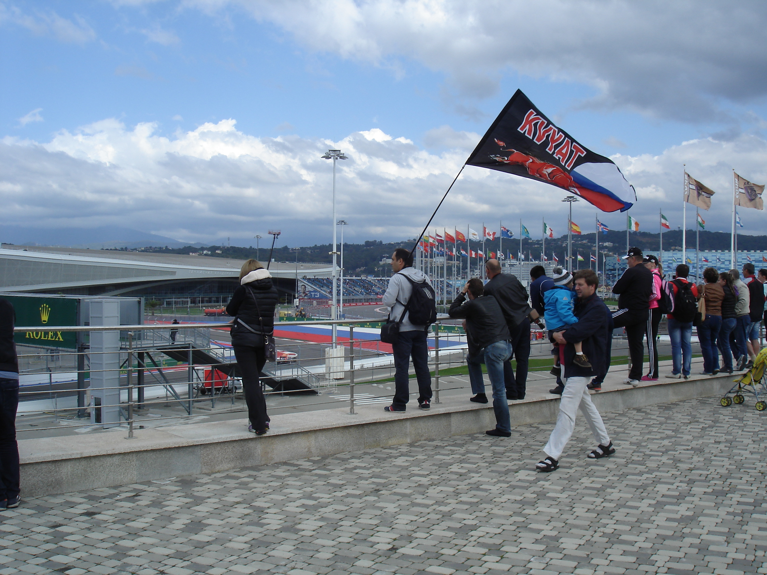 Сочи Автодром, вид на трибуну Т3 (имени Квята)